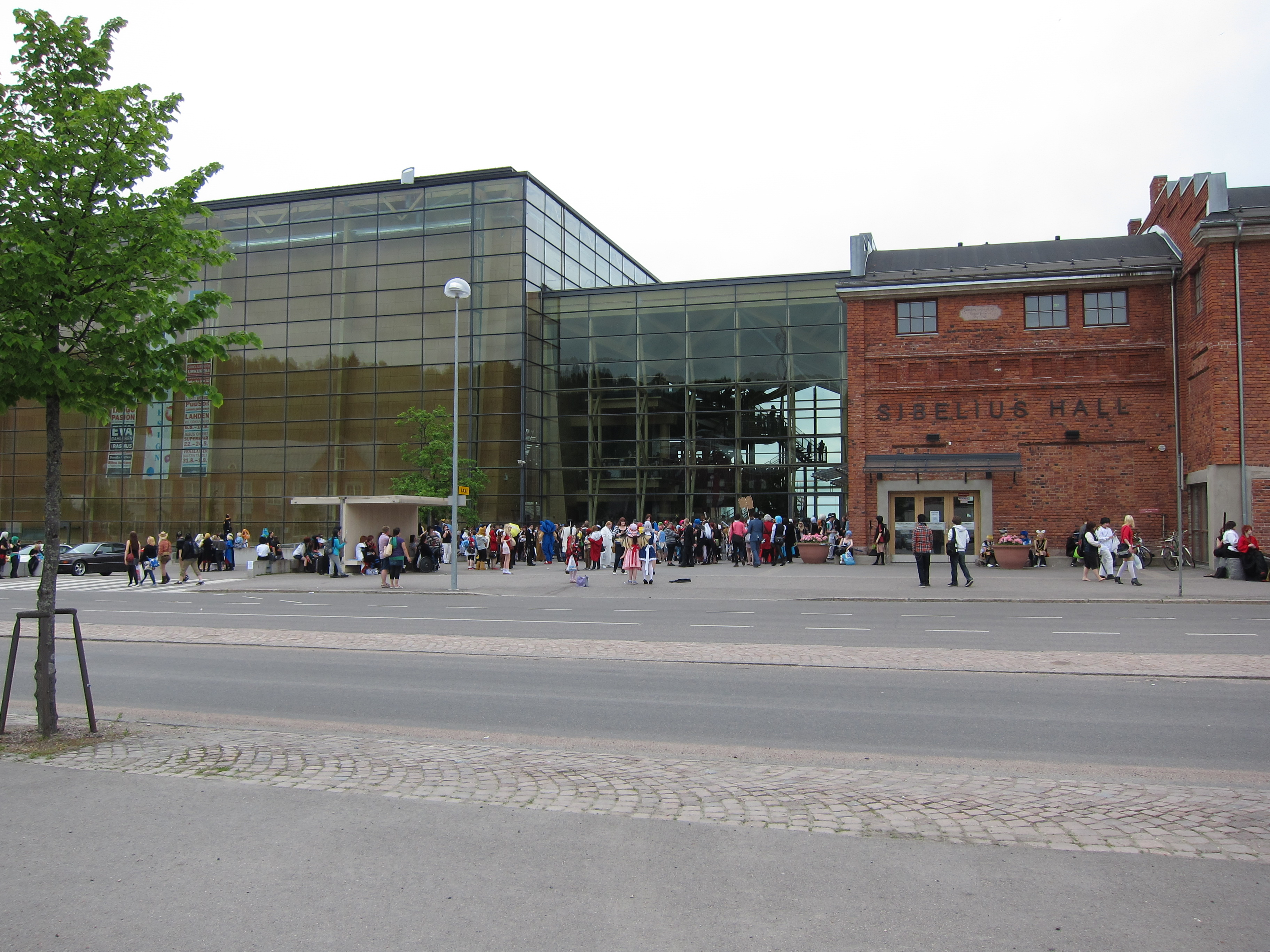 Yleiskuva Desucon-tapahtumasta Lahden Sibeliustalolla.